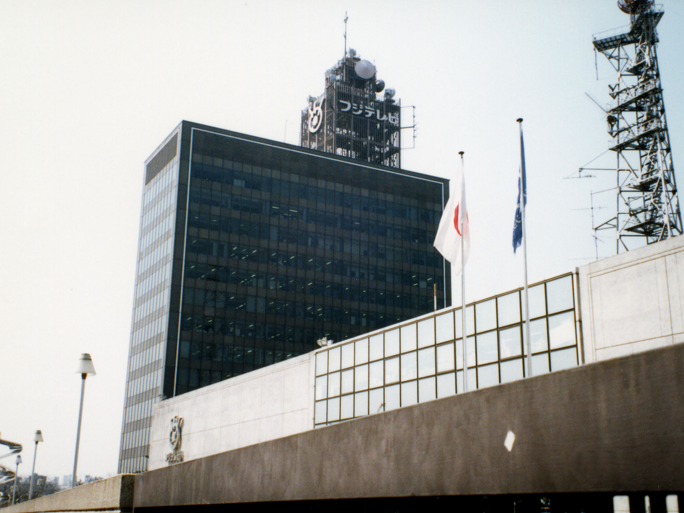 Former Fuji Television Headquarters in Kawadacho, Shinjyuju-ku, Tokyo, Japan.